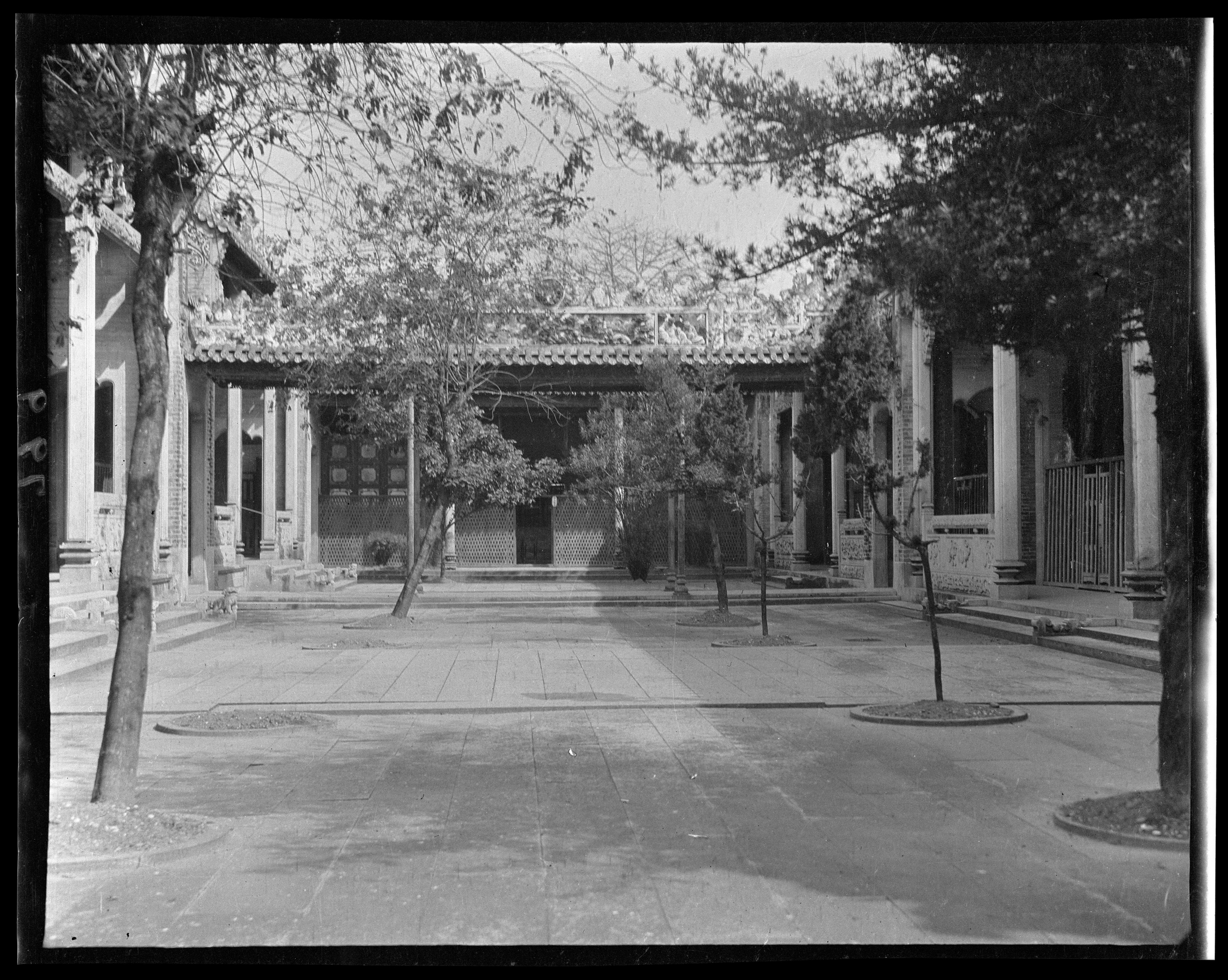 廣州市陳家祠院落